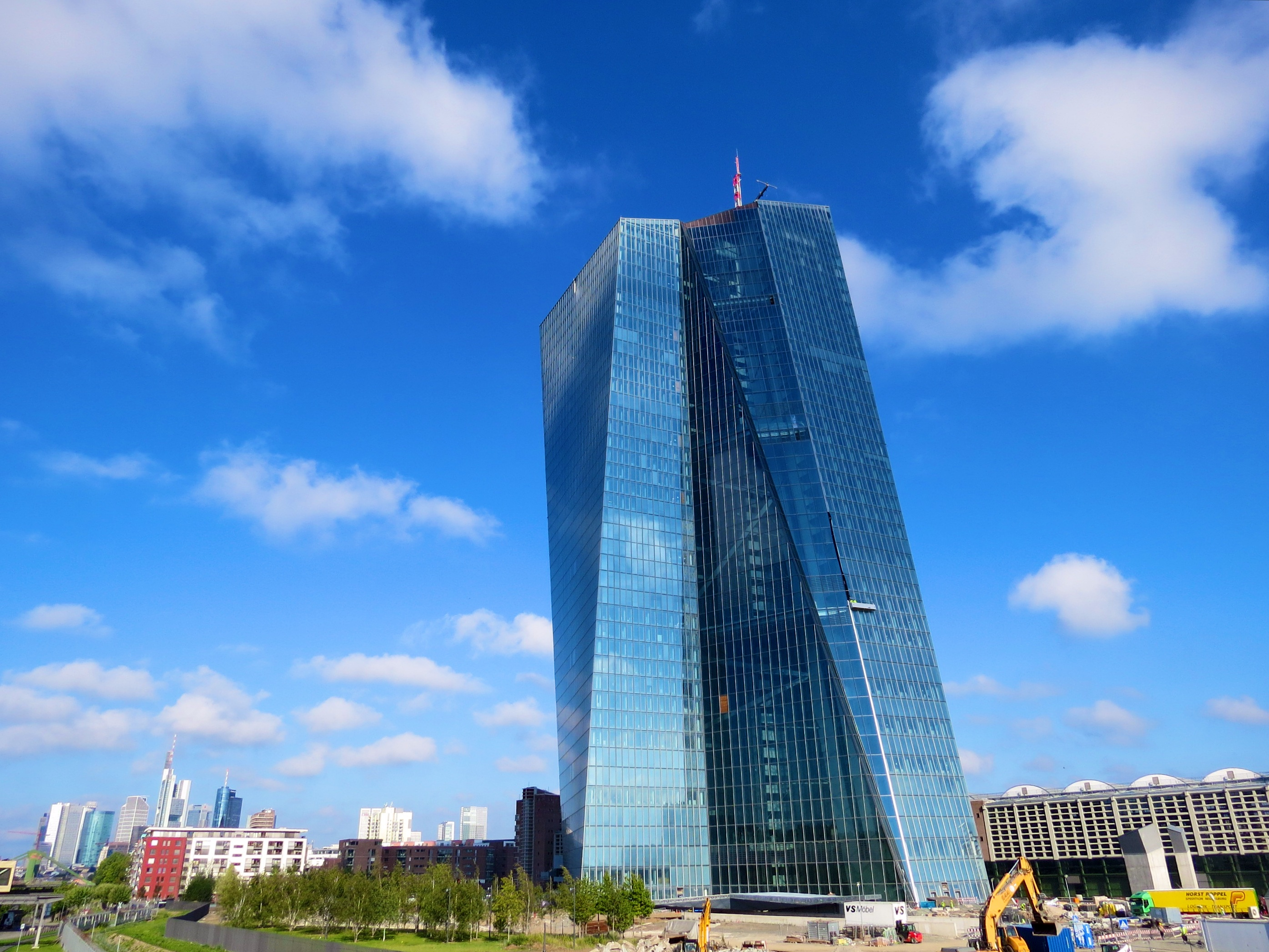 Neubau der Europäischen Zentralbank 03.09.2014